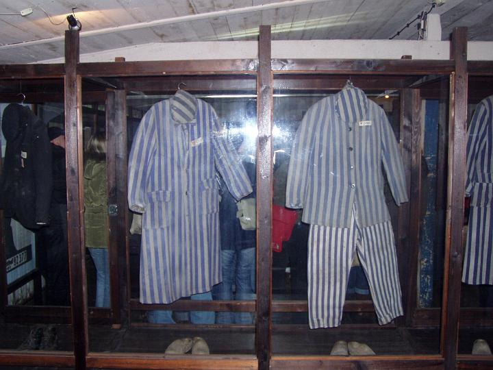 Ubiór więźnia w KL Stutthof